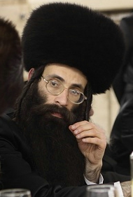 האדמו"ר מסטריקוב הרה"צ יעקב דן שטרן